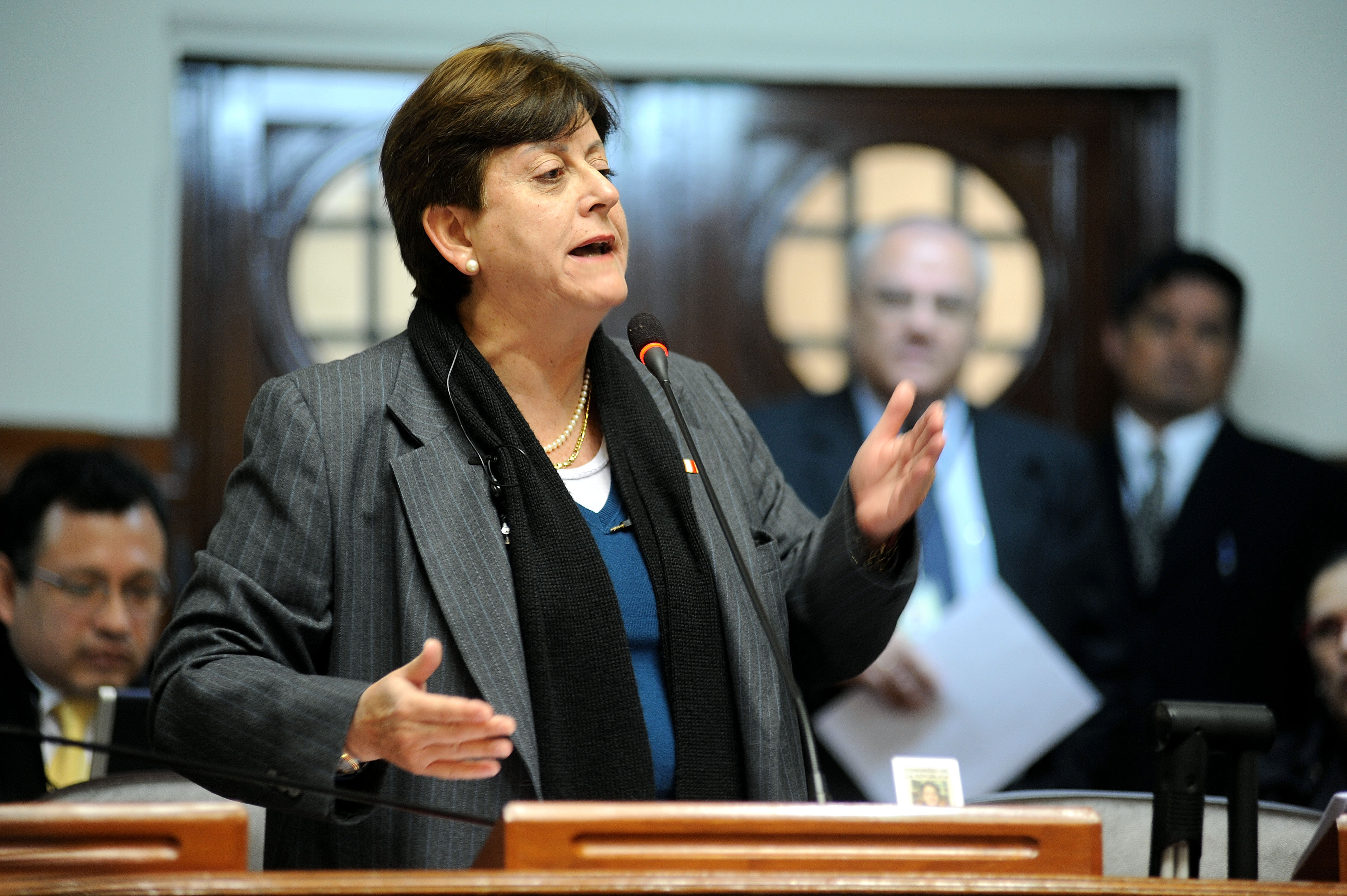 La legisladora Lourdes Alcorta fija su posición en el debate parlamentario realizado esta tarde por el Pleno.